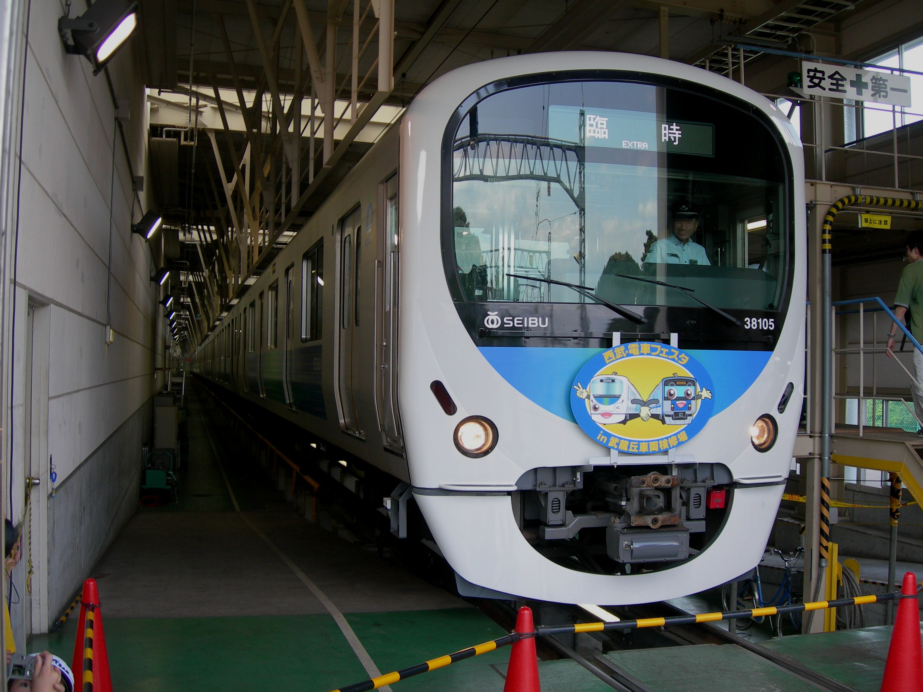 西武鉄道 30000系 武蔵丘車両検修場で撮影